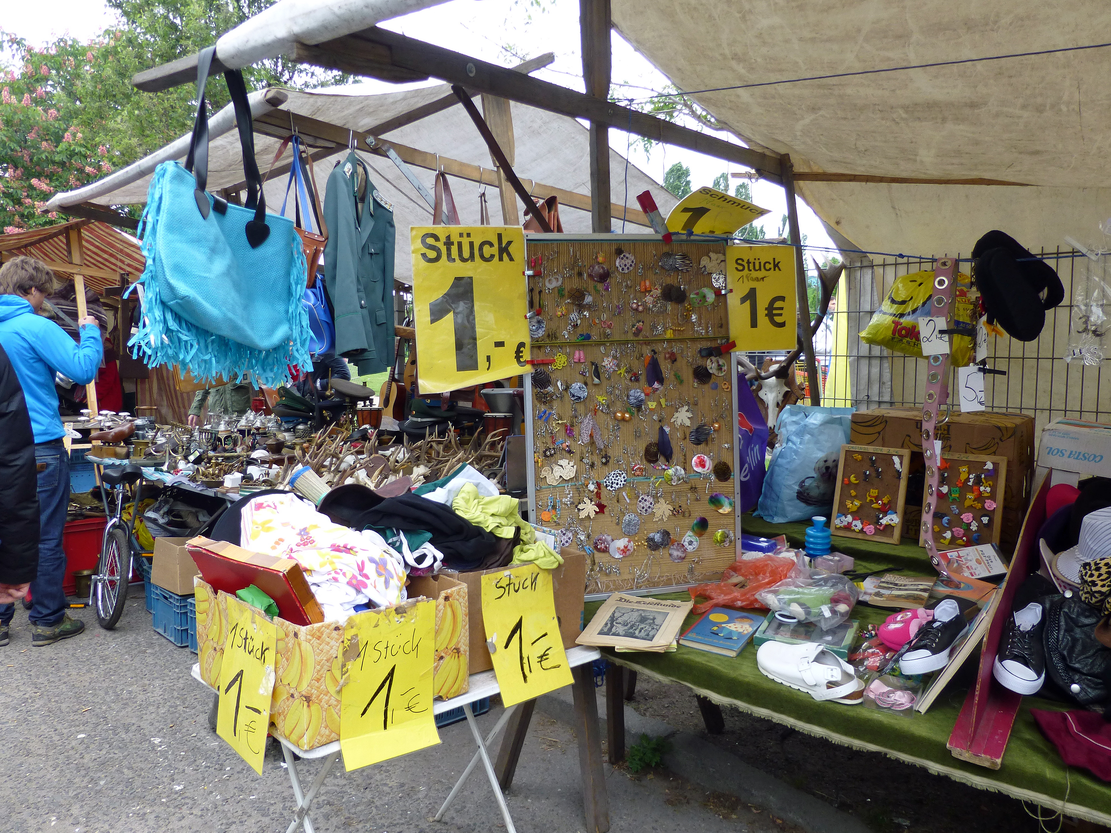 Berlin : marché aux puces au Mauerpark